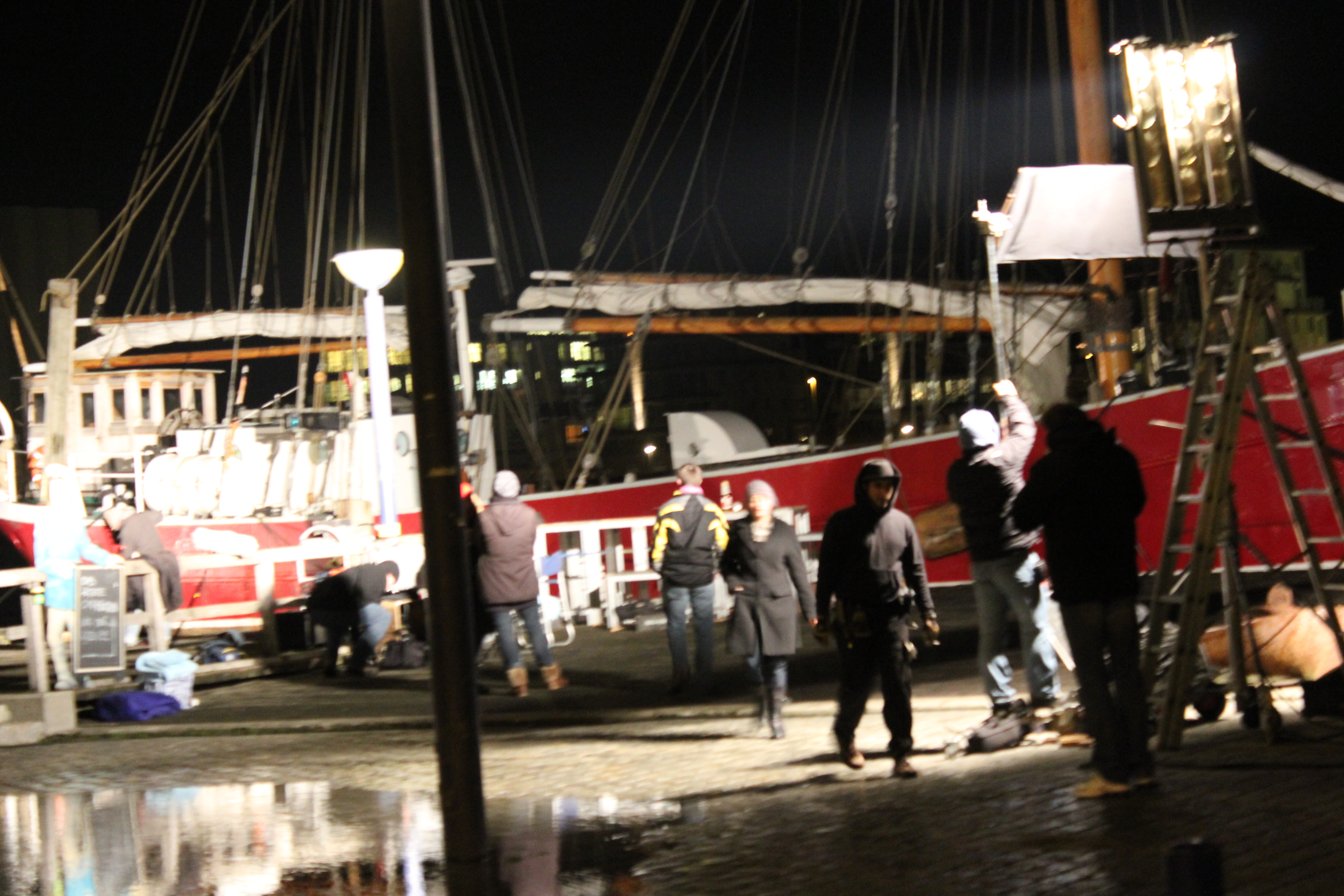 Filmset am Flensburger Hafen (Spielfilm Der Schatten – Bild 3)